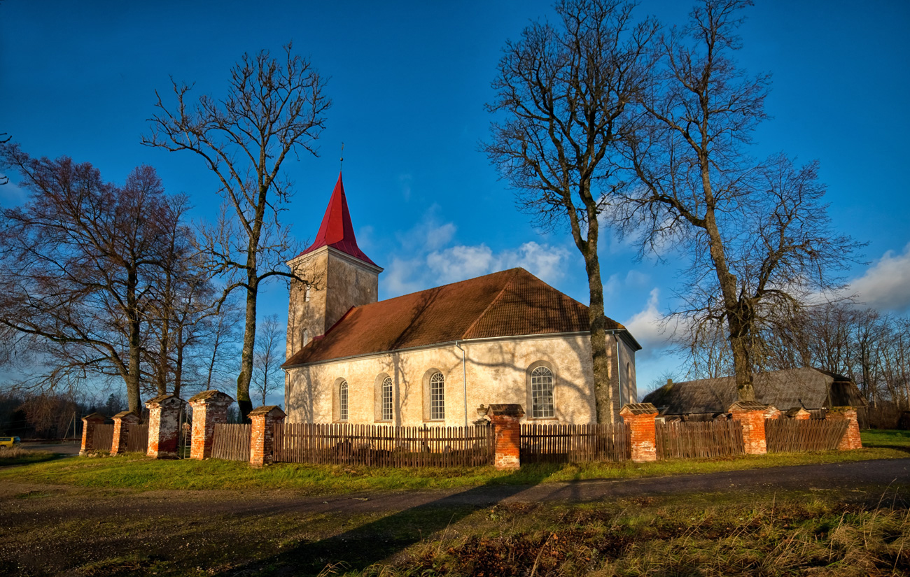 Stendes luterāņu baznīca un kapliča, Dižstende